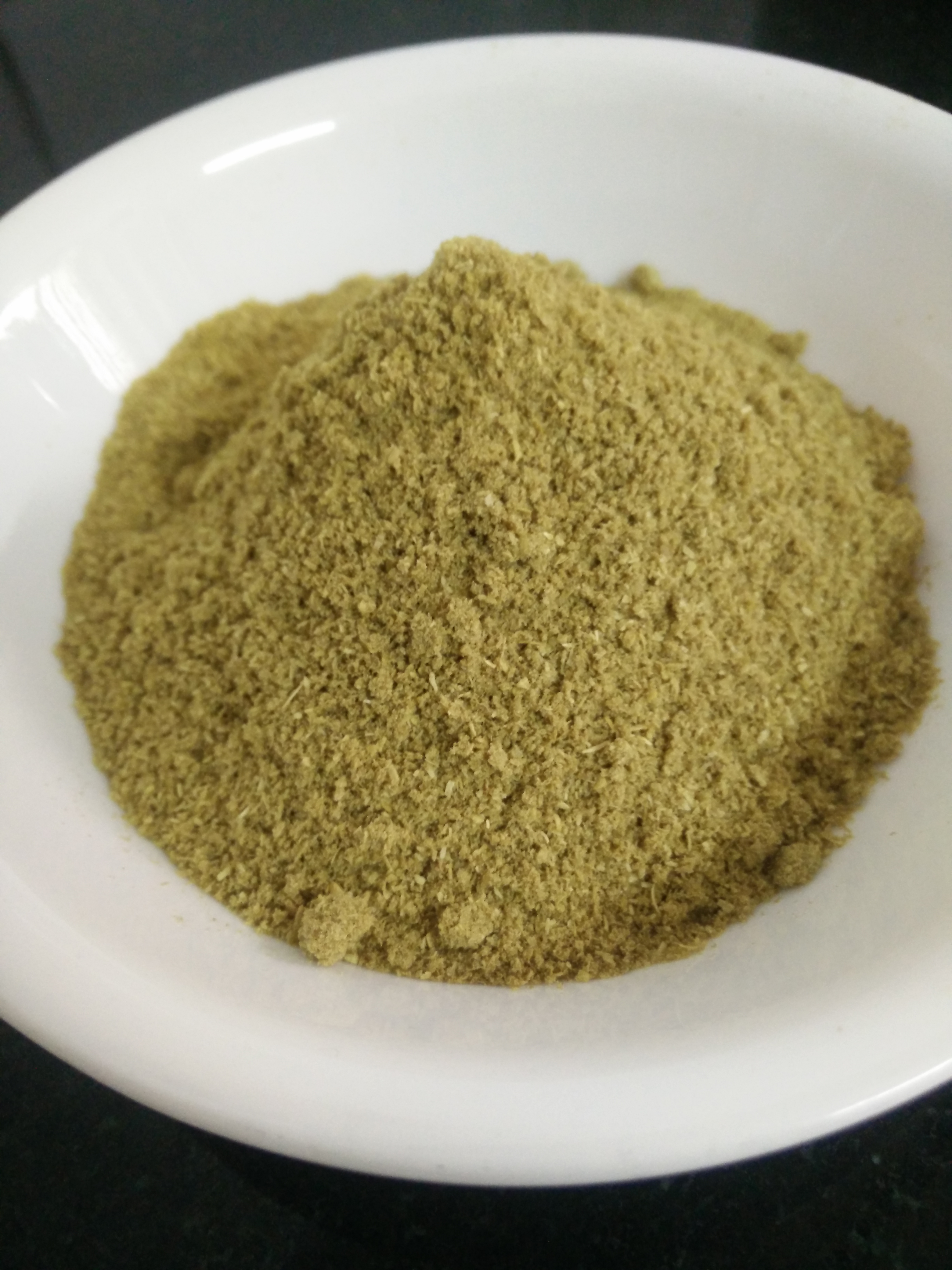 Dhana jiru is mix Indian spice